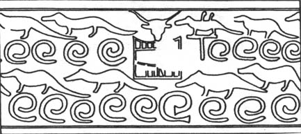 selo com crocodilos